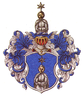 Vaakuna